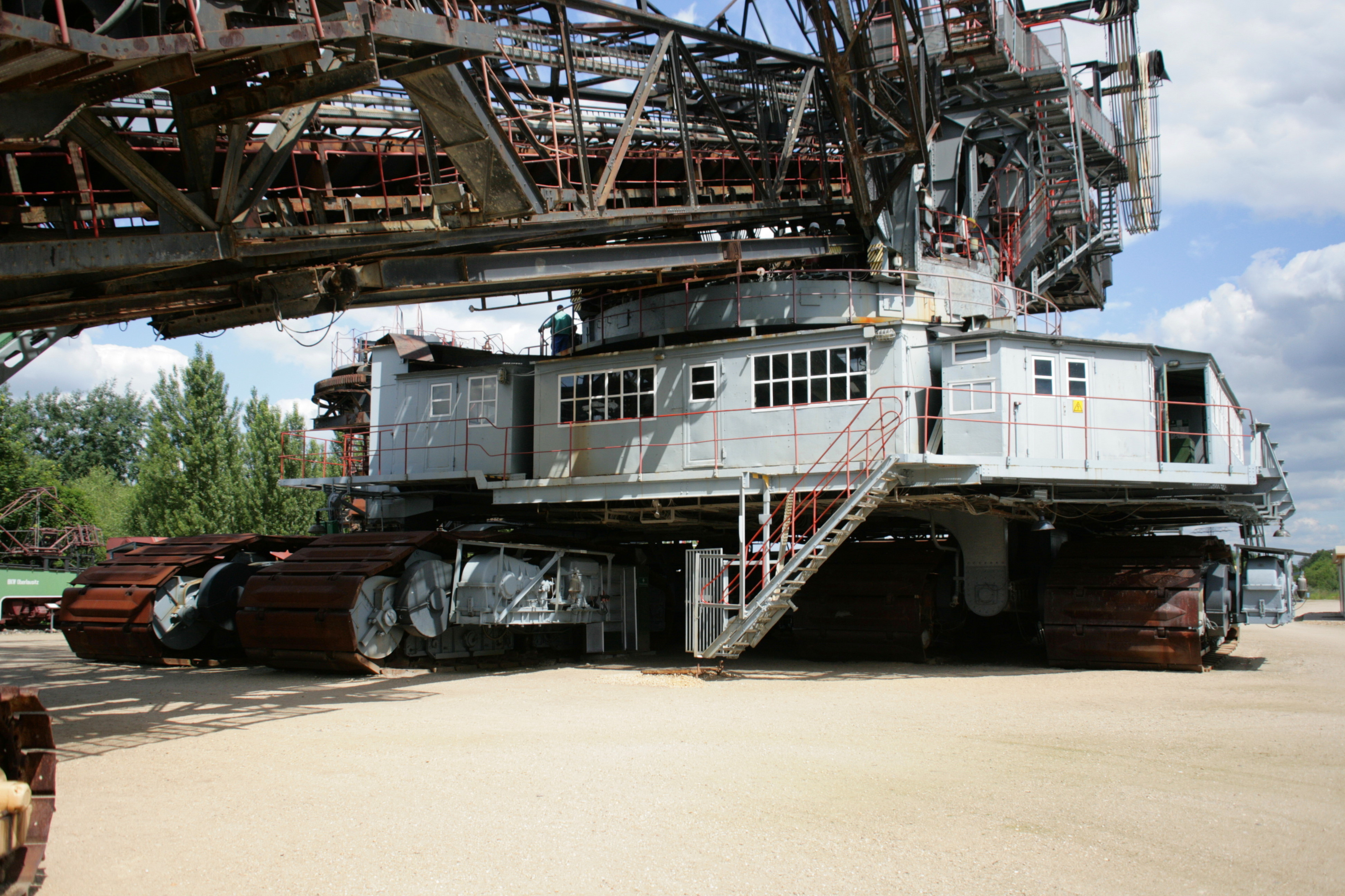 Schaufelradbagger 1452 im Museum “Bagger 1452”, Berzdorfer Straße 102 in Görlitz